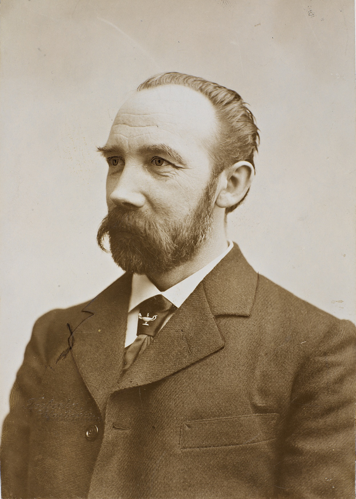 Tittel / Title: Portrett av Moltke Moe Beskrivelse / Description: Kabinettkort / cabinet card. Moe var sønn av Jørgen Moe (1813-1882), og folklorist. Da faren og P. C. Asbjørnsen døde, overtok han utgivelsen av eventyrene, og utga flere reviderte og fornorskede utgaver. Dato / Date: ukjent / unknown Fotograf / Photographer: L. Forbech (Christiania) Sted / Place: Oslo Eier / Owner Institution: Nasjonalbiblioteket / National Library of Norway Lenke / Link: Bildesignatur / Image Number: blds_01343